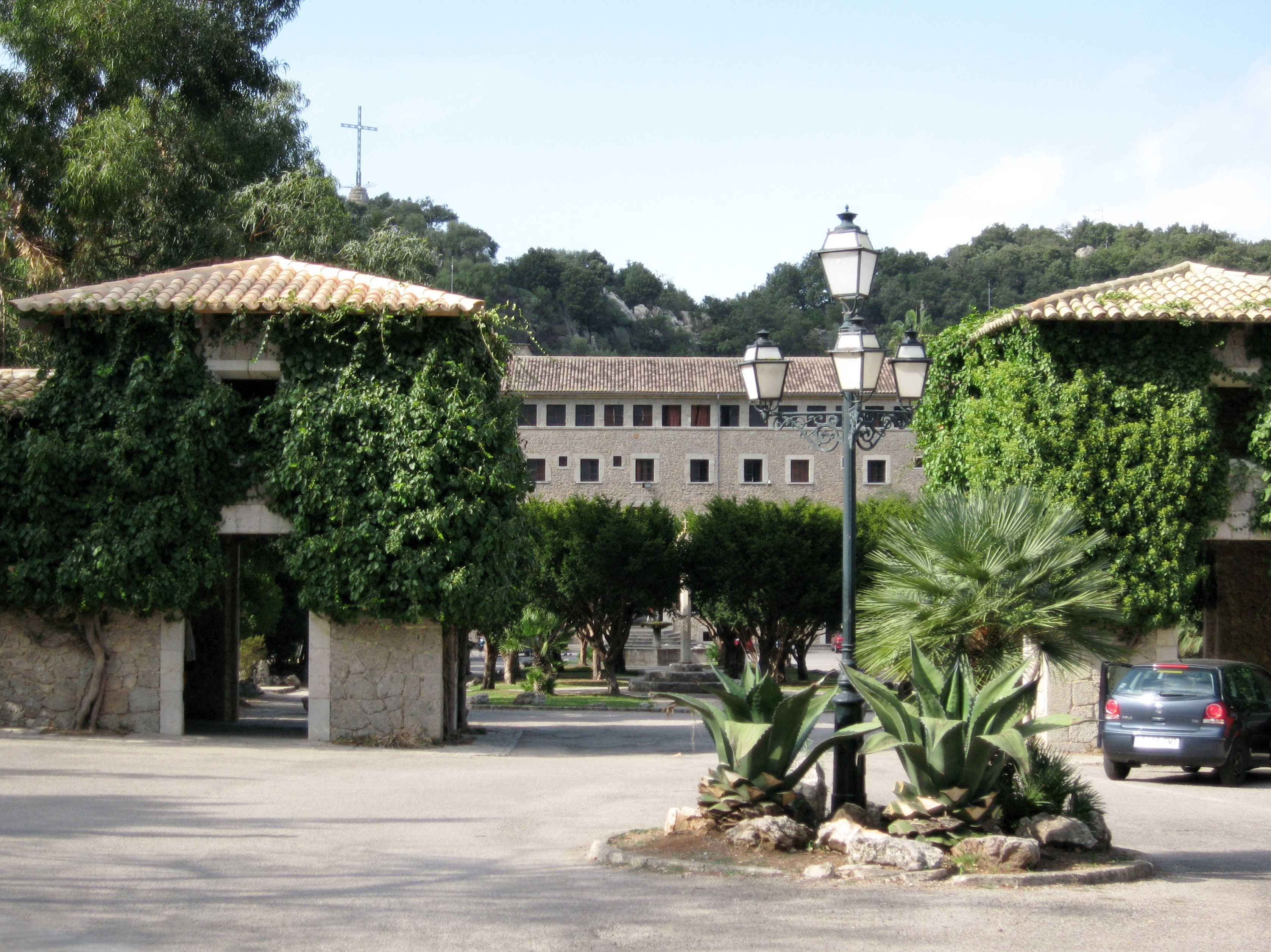 Santuari de Lluc, Gemeinde Escorca, Mallorca, Spanien